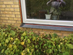 fremhævet med rødt: ilmodsfuge